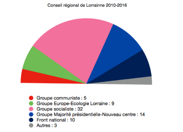 Français cadien: Composition politique du Conseil régional de Lorraine 2010-2016